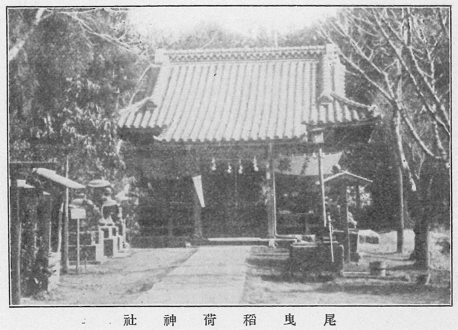 館林尾曳稲荷の古写真